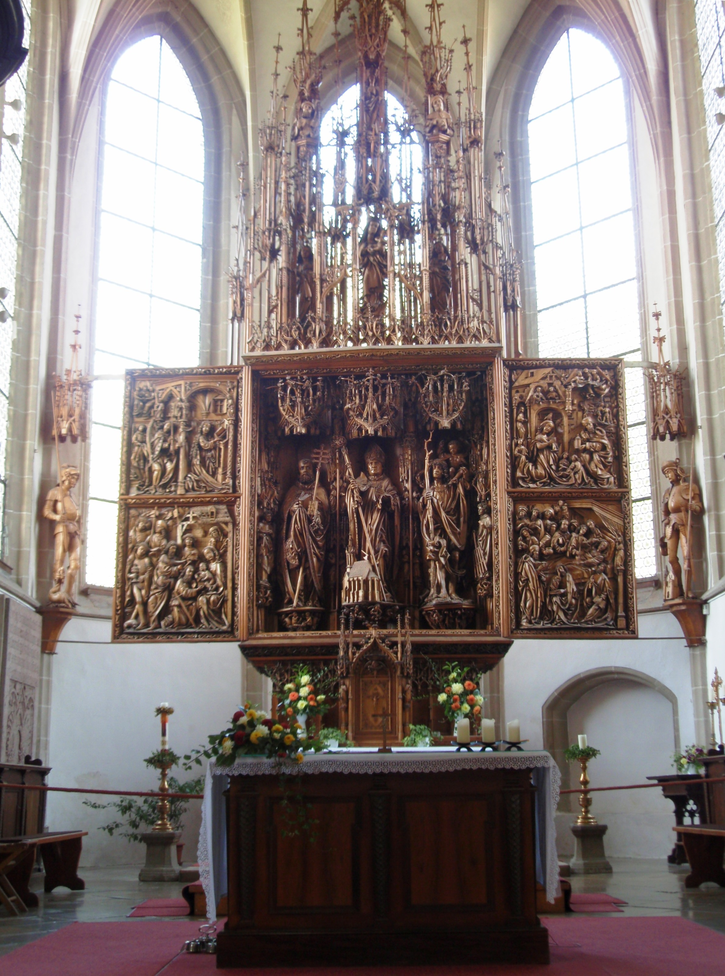 Flügelaltar Kefermarkt, Gesamtansicht